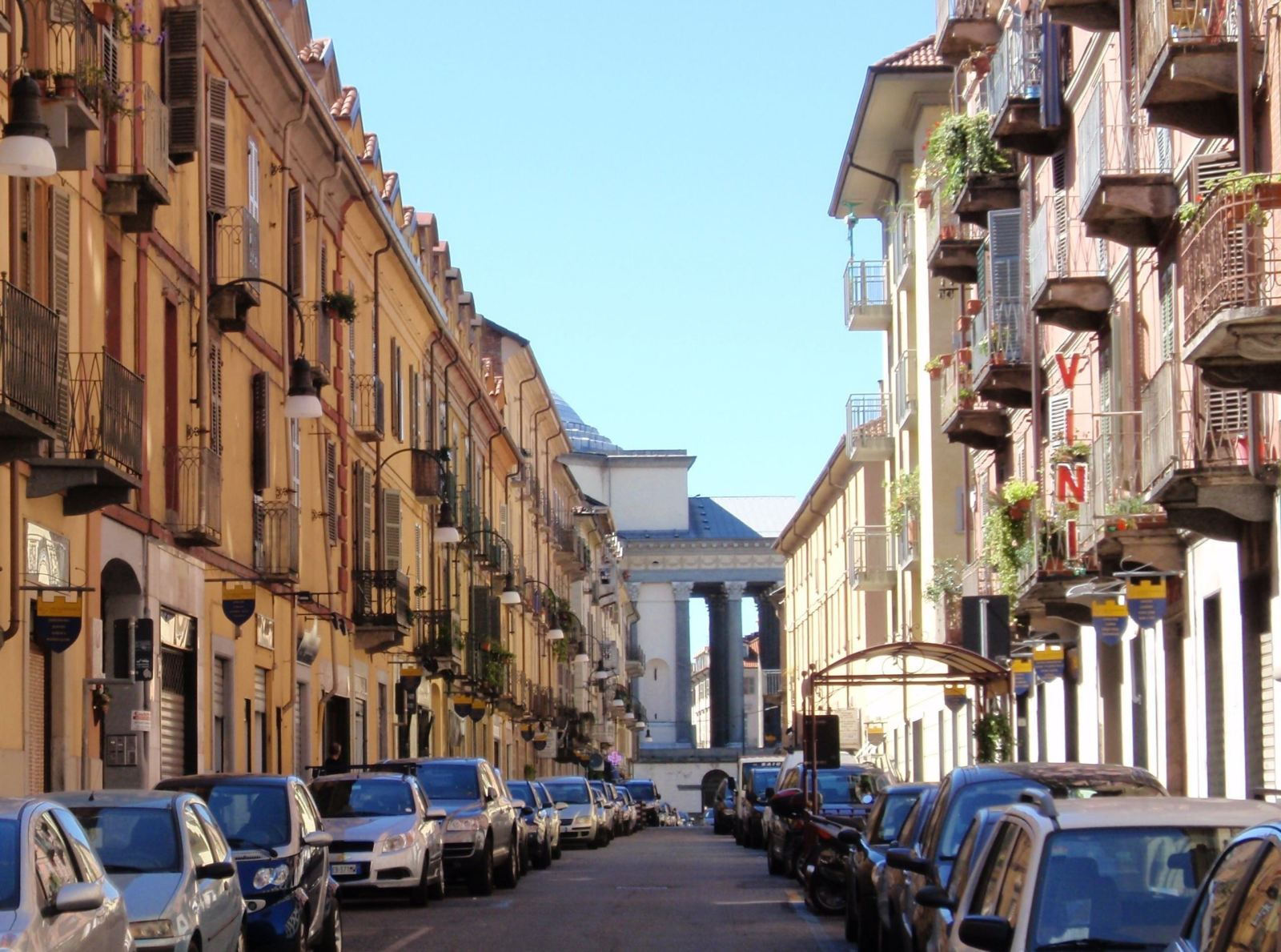 Foto del quartiere Borgo Po Torino